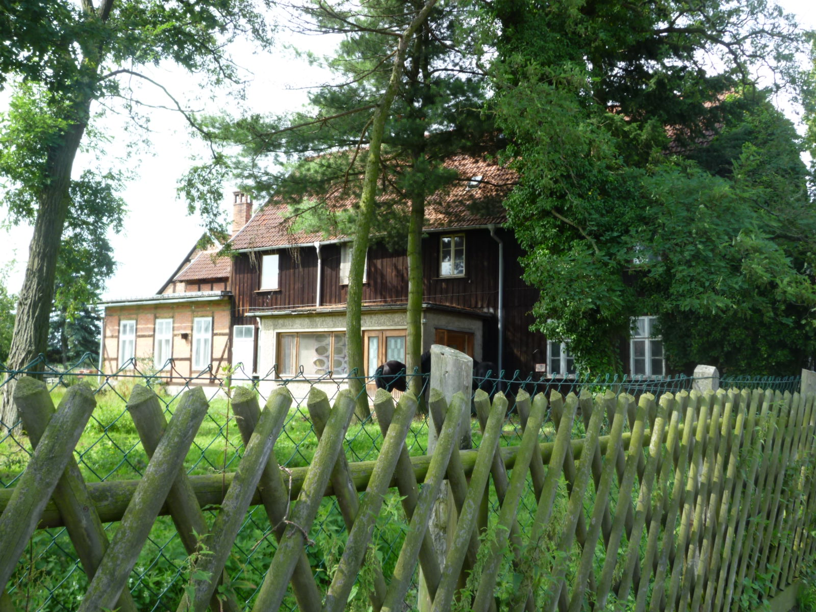 Herzogliche Försterei, Wohngebäude Seitenansicht in Calvörde, 2011